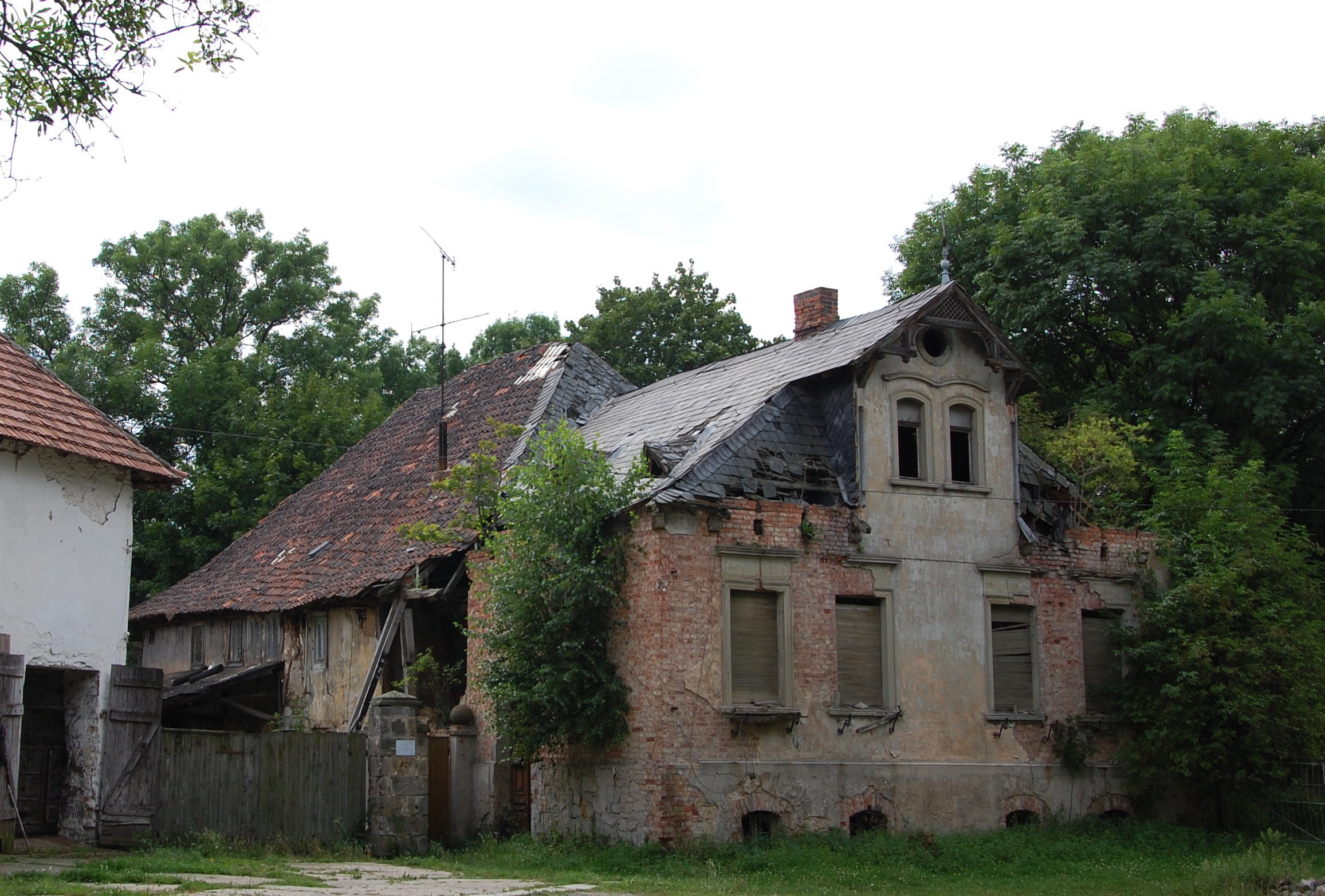 Haus Bachstraße 2 in Gernrode